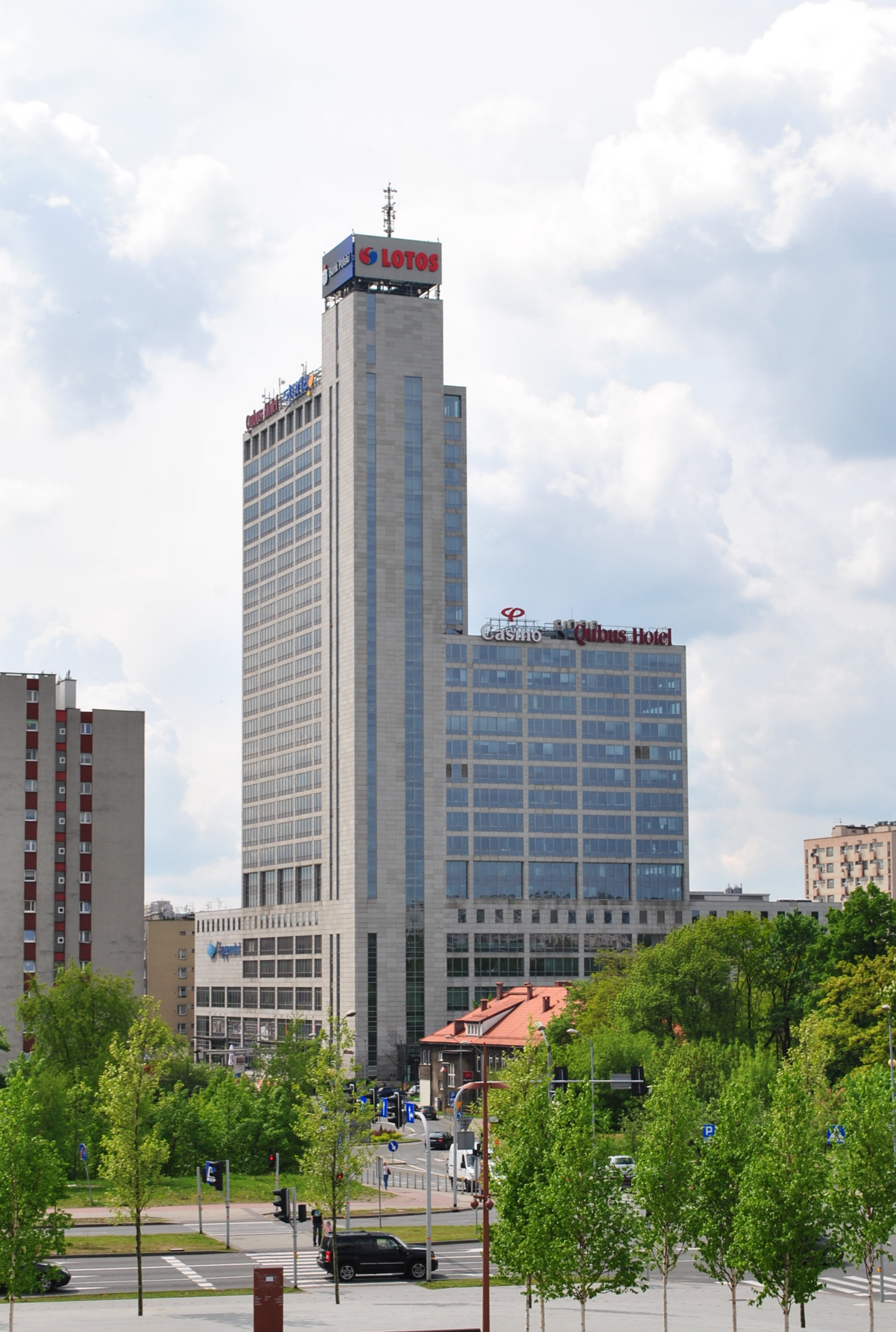 Wieżowiec Altus w Katowicach